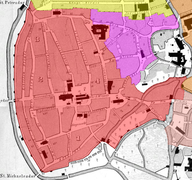 Die Altstadt (Weichbild) um 1400 auf einer historischen Karte (rot eingezeichnet)